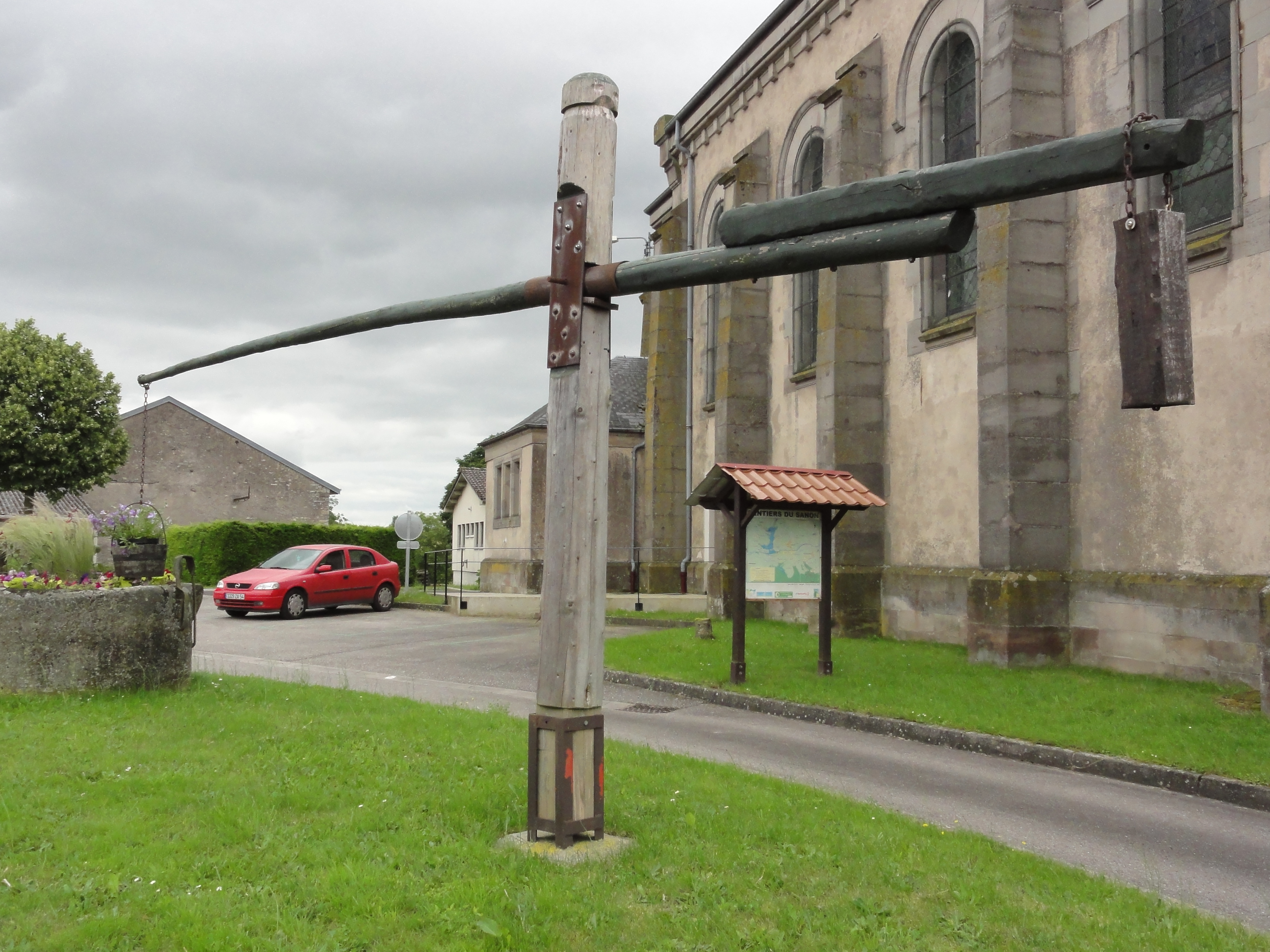 Parroy (M-et-M) puits avec levier